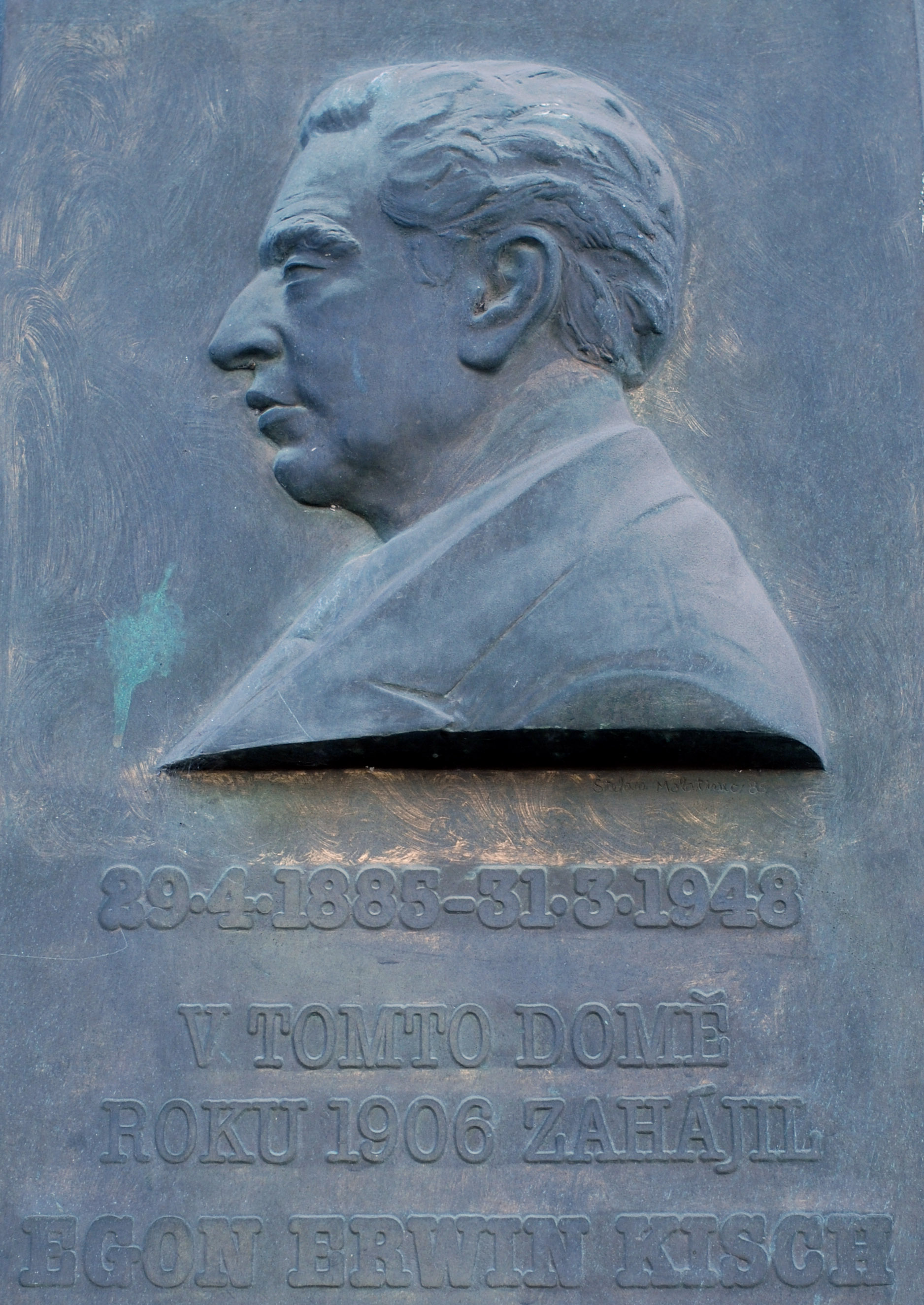 Gedenktafel für Egon Erwin Kisch an einer Hauswand in Prag